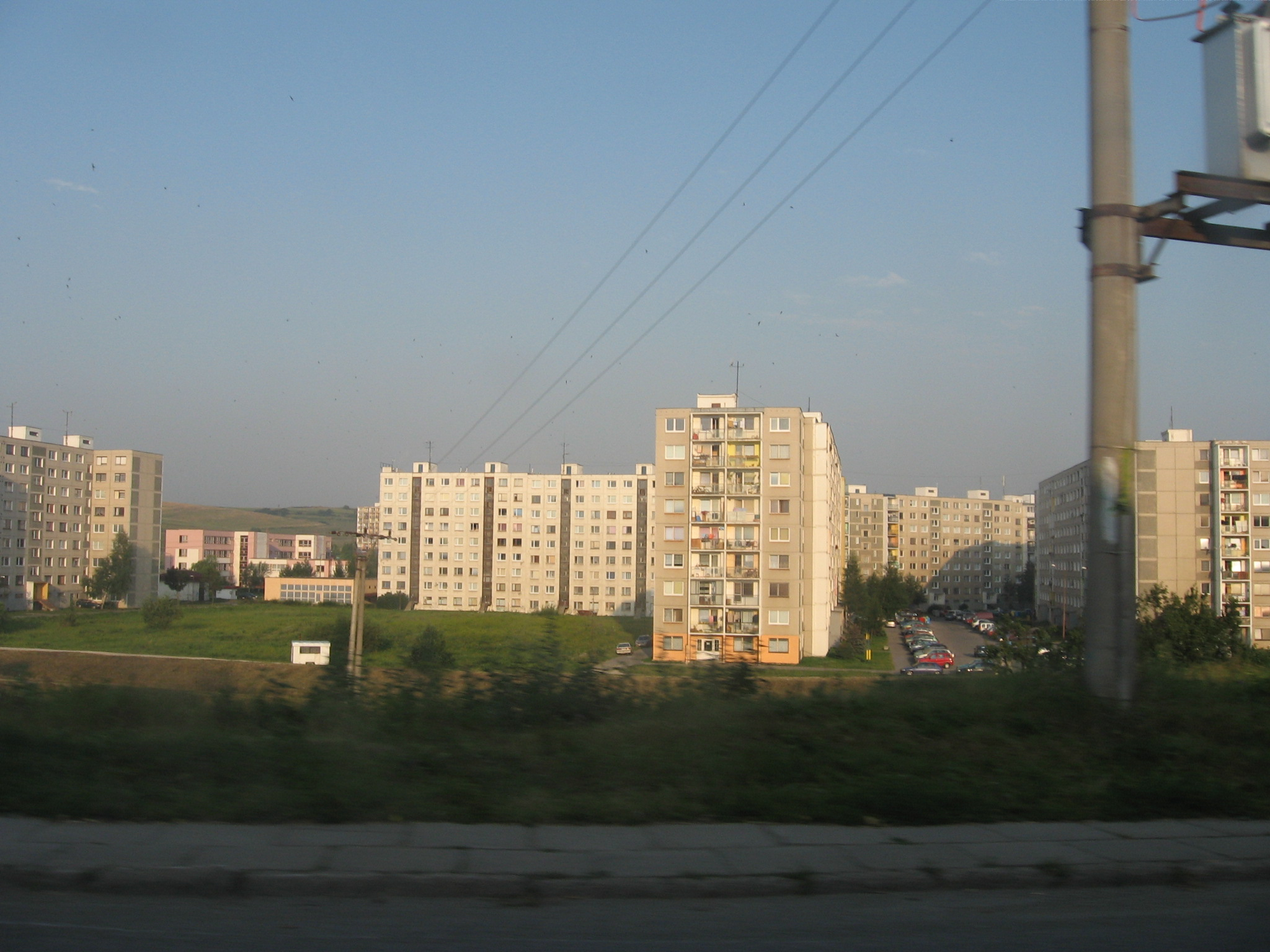 Česky: Panelové sídliště Ľubica v okrese Kežmarok, Slovensko